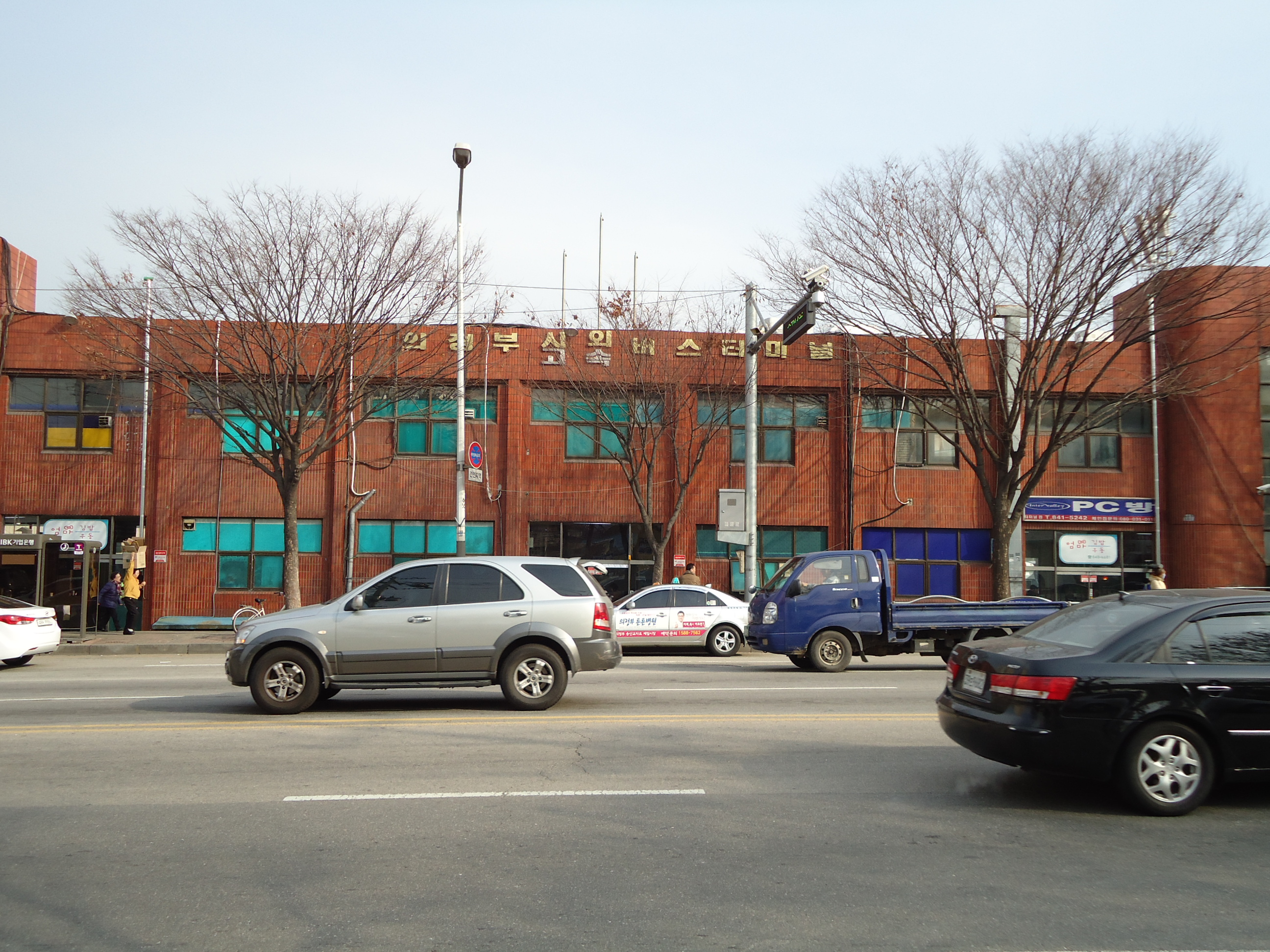 의정부 시외, 고속버스터미널 주소: 경기도 의정부시 금오동 369-5